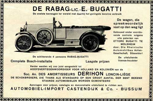 Rabag/Rabag-Bugatti (D - Automobiel-import Castendijk & Co., Bussum/Amsterdam advertentie oktober 1923